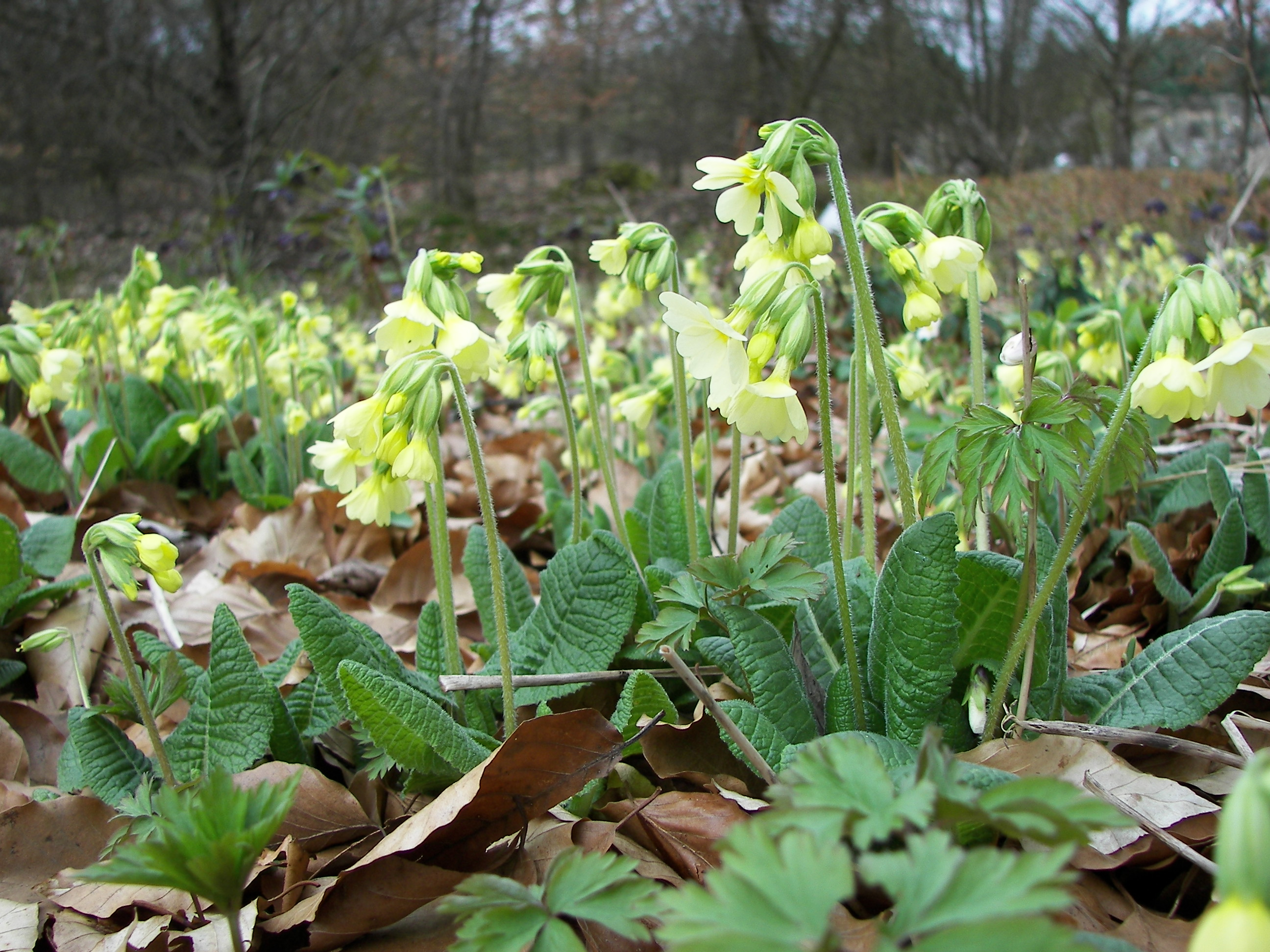 Hohe Schlüsselblume (Primula elatior) im Neuen Botanischen Garten Marburg, Abteilung Frühlingswald